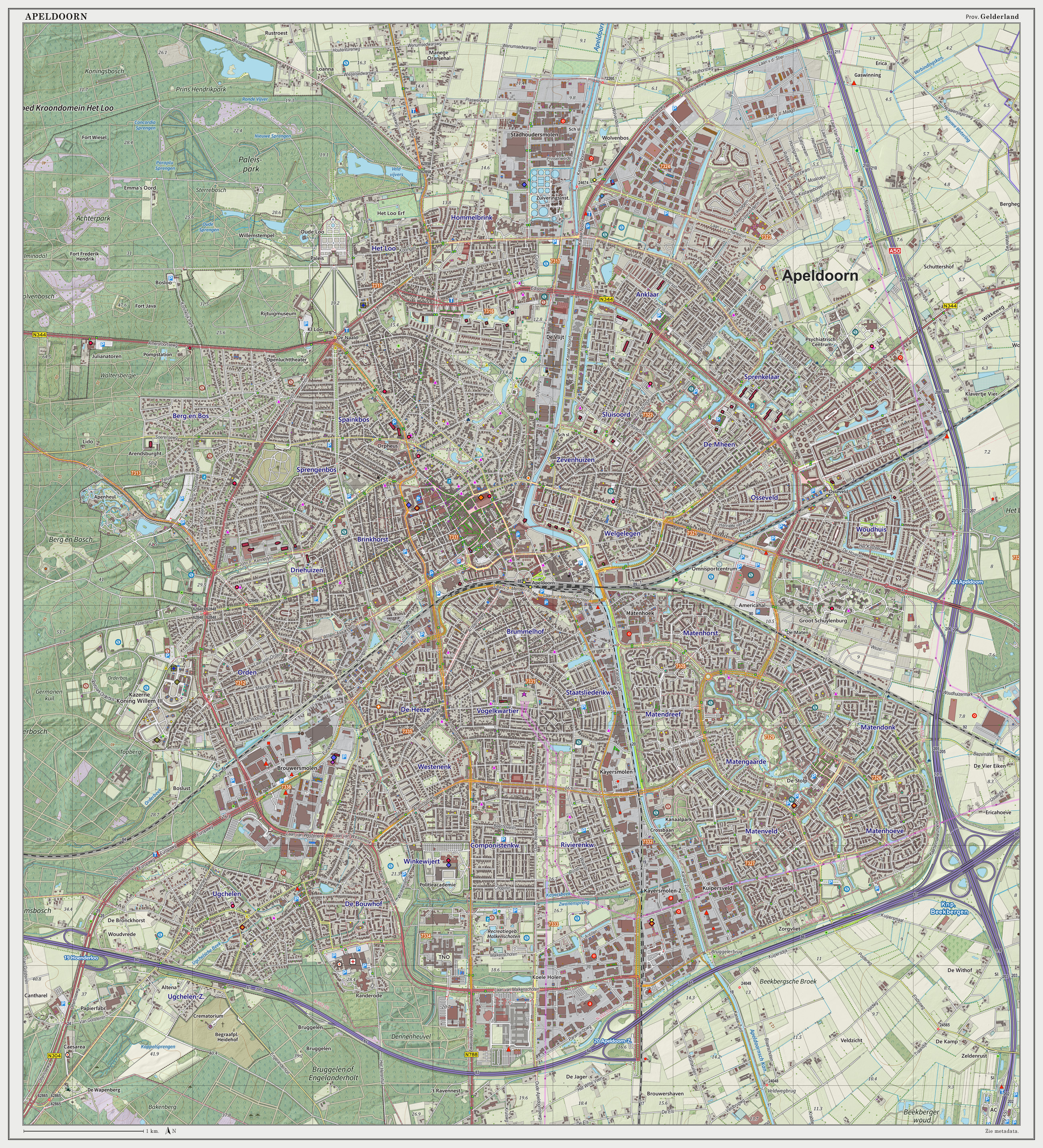 Topografische kaart van Apeldoorn (woonplaats). Resolutie: 300 pixels/km. Kaartbeeld samengesteld uit de open geodata van de Top10NL en Top25namen (Basisregistratie Topografie, Kadaster), Creative Commons BY licentie. Gebouwvlakken uit open geodata BAG extract. Wegen uit de OpenStreetMap. Reliëfschaduw uit de Actuele Hoogtekaart AHN2. Samenstelling en kleurenschema: Jan-Willem van Aalst, met QGIS2. Zie ook de Legenda.